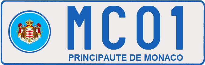 Targa automobilistica posteriore apposta sull'auto del Principe di Monaco